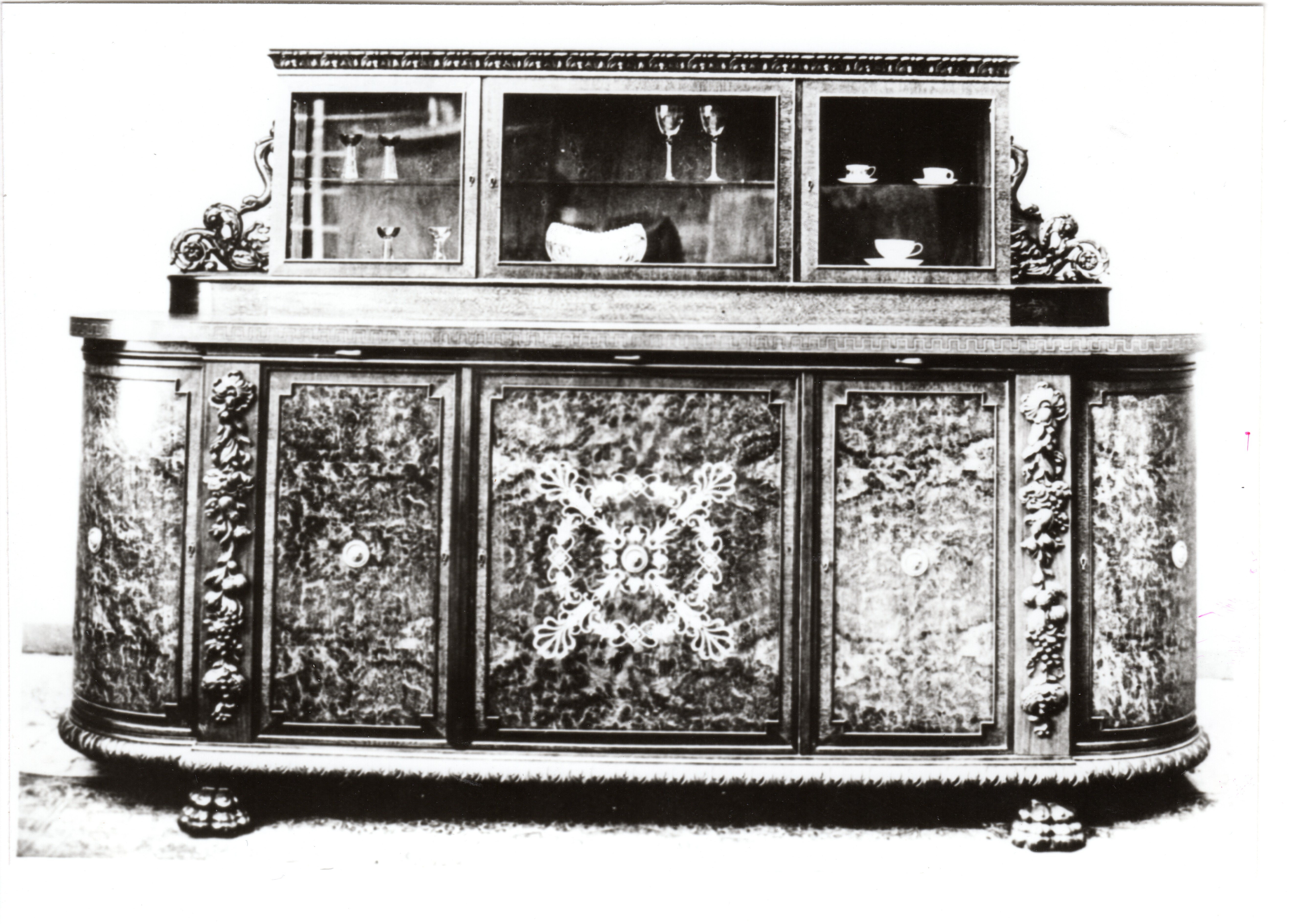 Büfett im spätviktorianischen Stil, 1930er Jahre Katalogabbildung Möbelfabrik Gerhard Strato, Steinheim/Westfalen